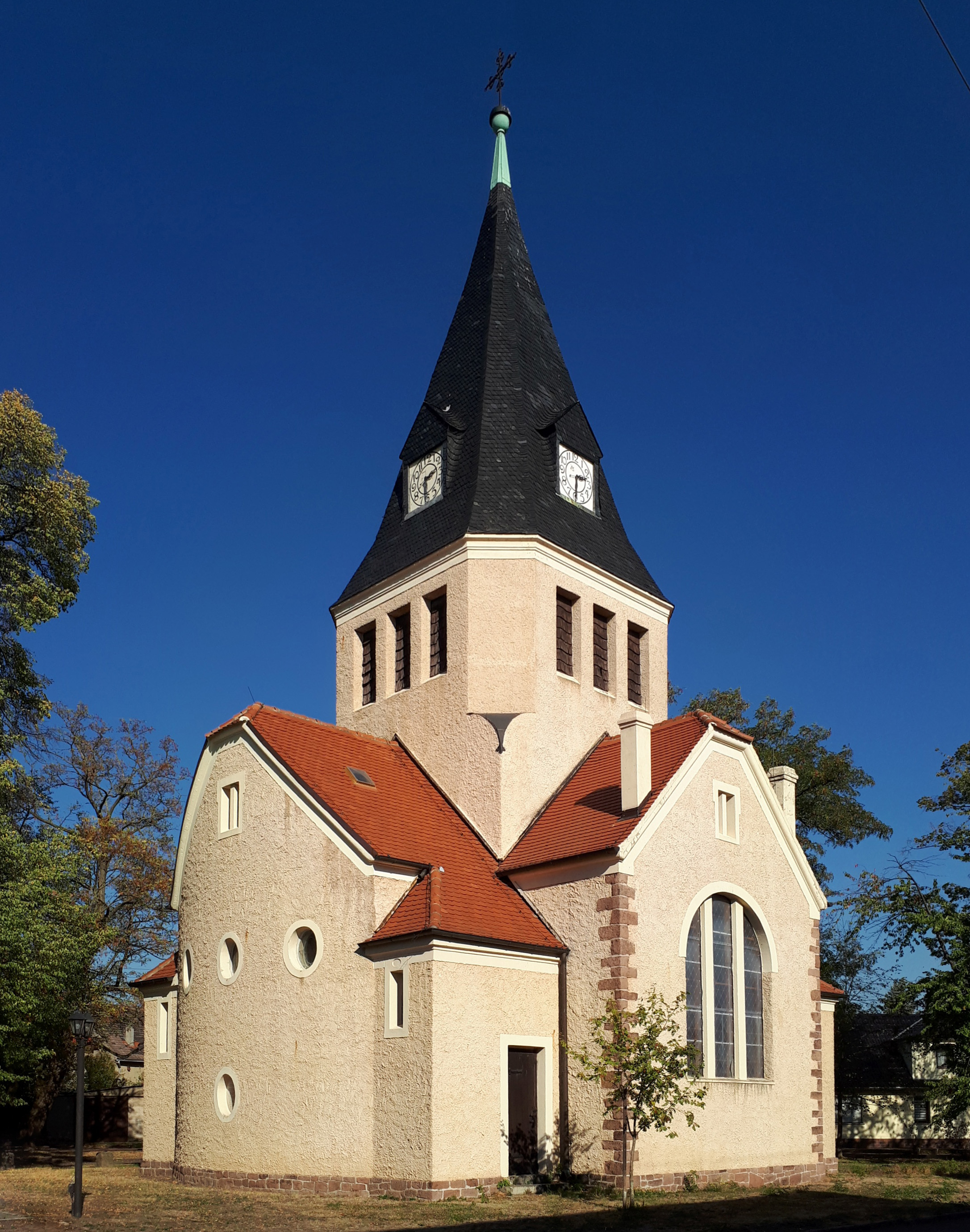 Kulturdenkmal Kirche Gnetsch